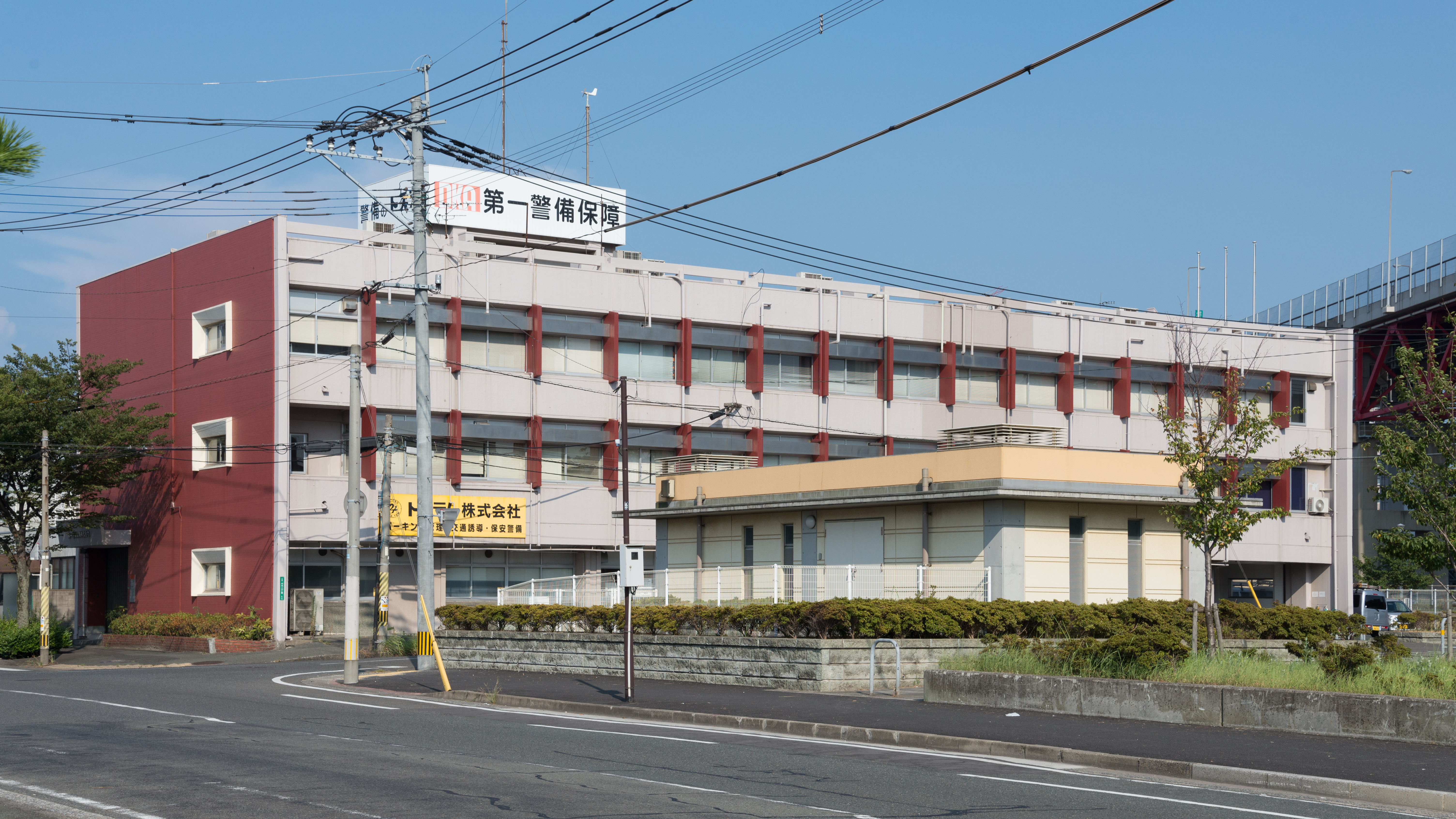 第一警備保障の本社 撮影場所：福岡県北九州市戸畑区川代2丁目1番2号